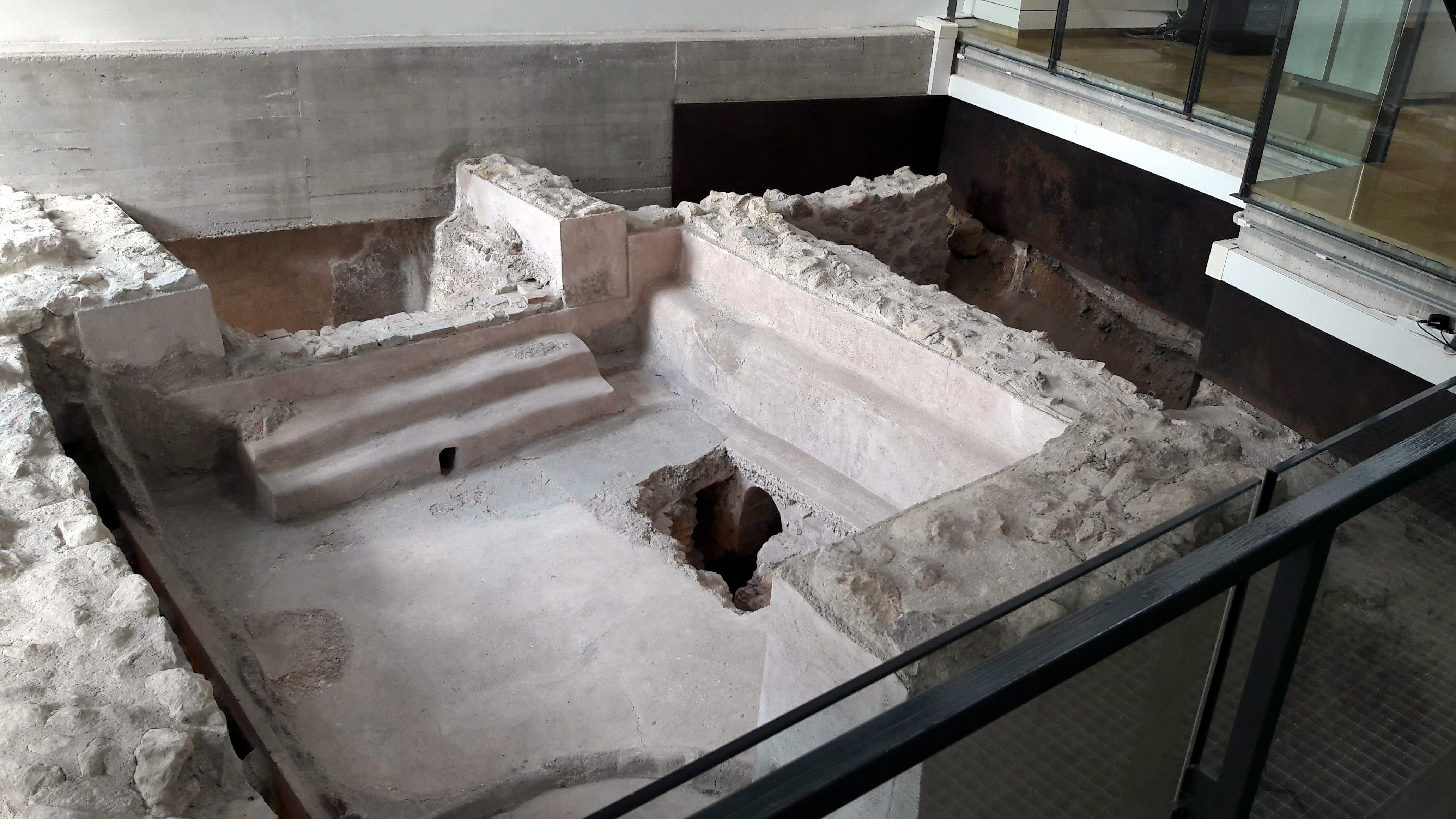 Museo Arqueológico Los Baños-zona femenina1